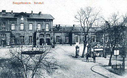 Postkarte des 1866 errichteten Bahnhofs Sangerhausen, der 1945 durch einen explodierenden Munitionszug zerstört wurde.